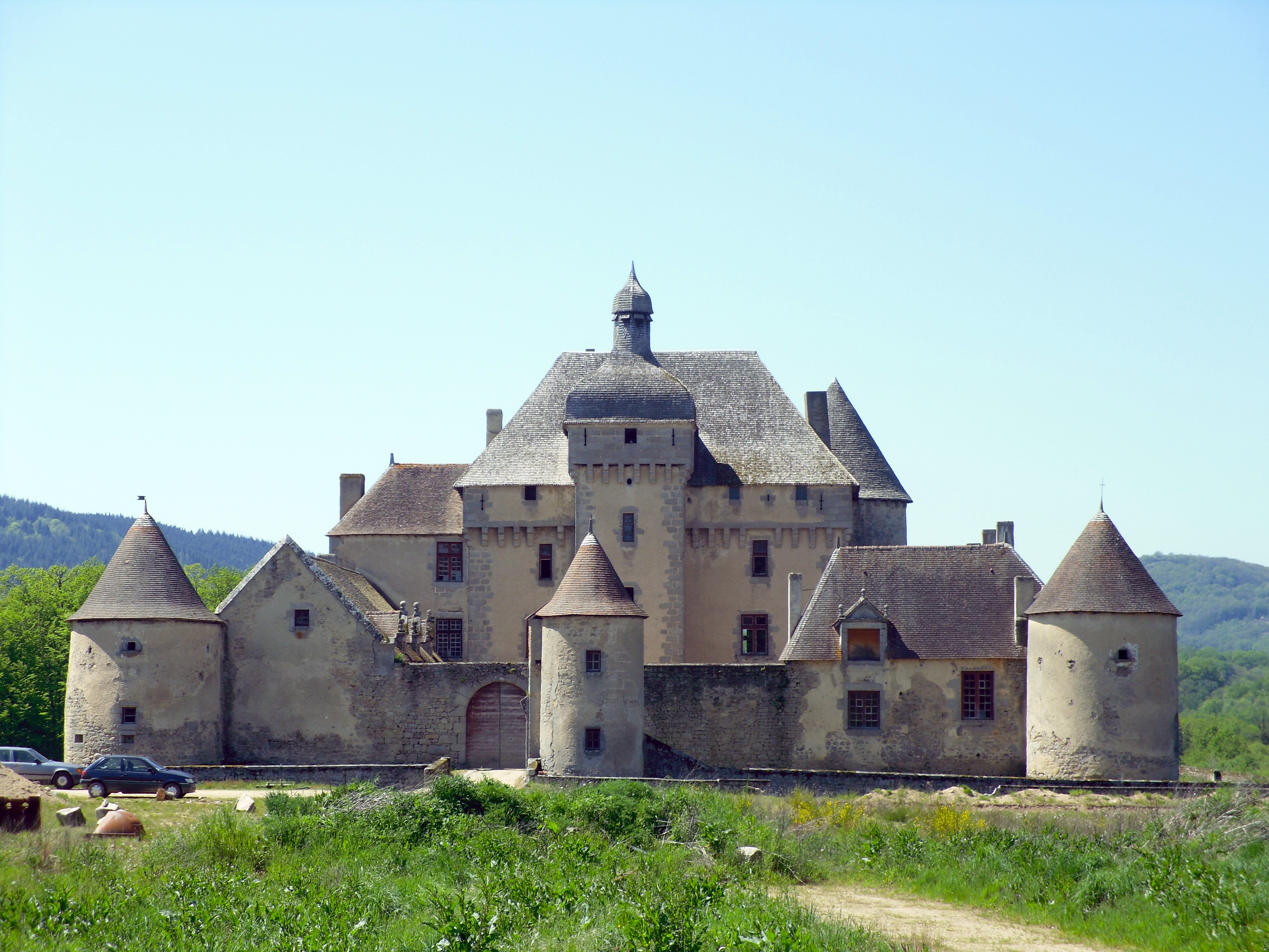 Château XIVe siècle